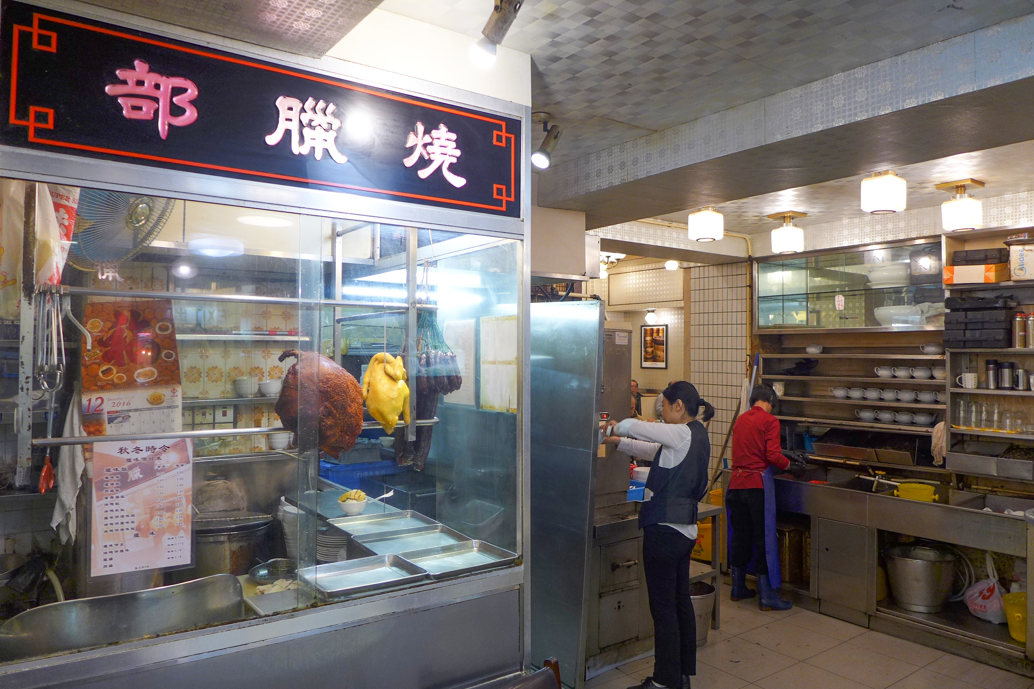 Shun Hing Restaurant Interior